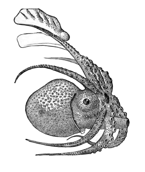 Argonauta argo female